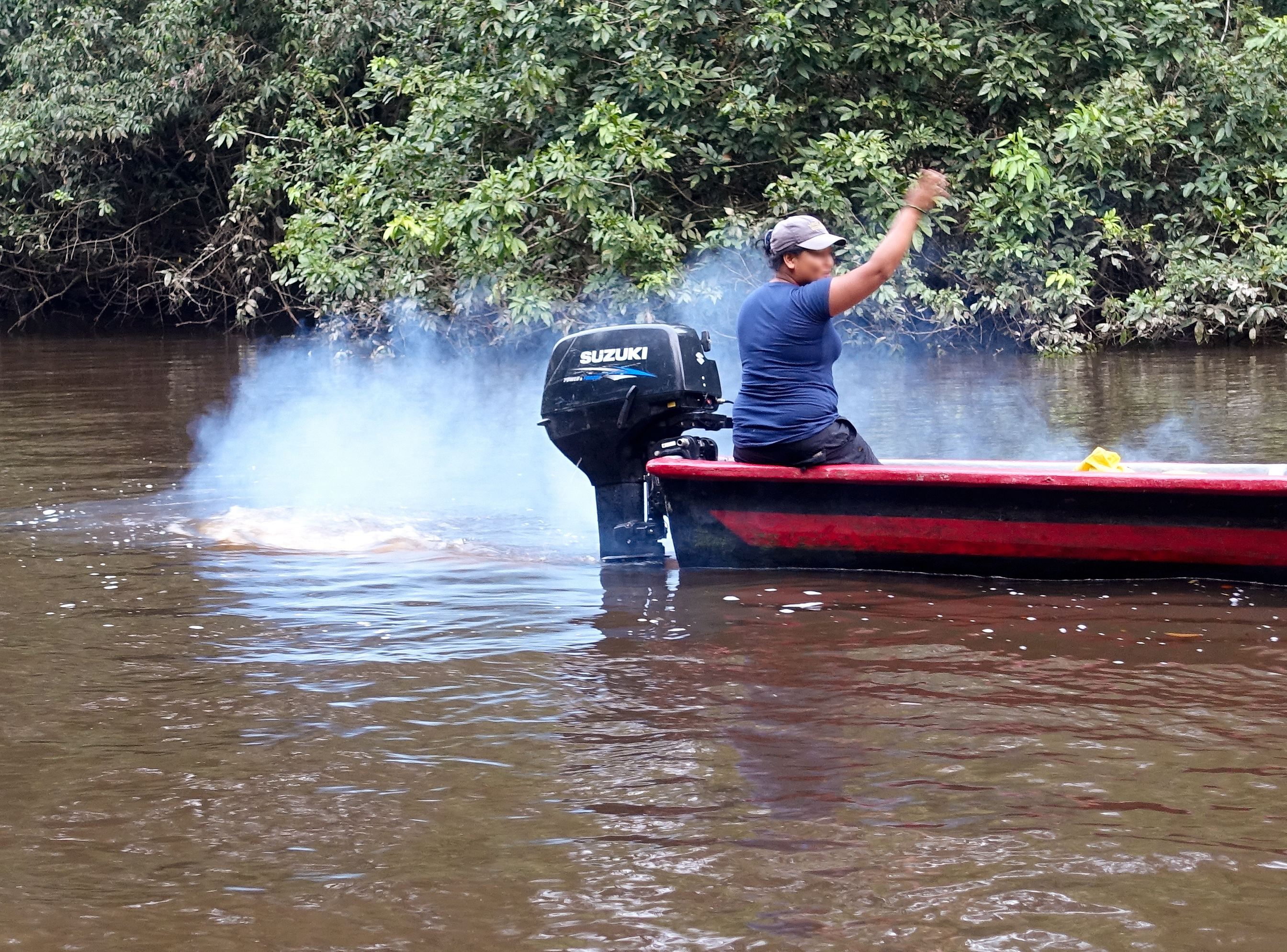 Die Luftverschmutzung durch die vielen touristischen Motorboote belasten die Ökosysteme des Cuyabeno-Reservates in Ecuador